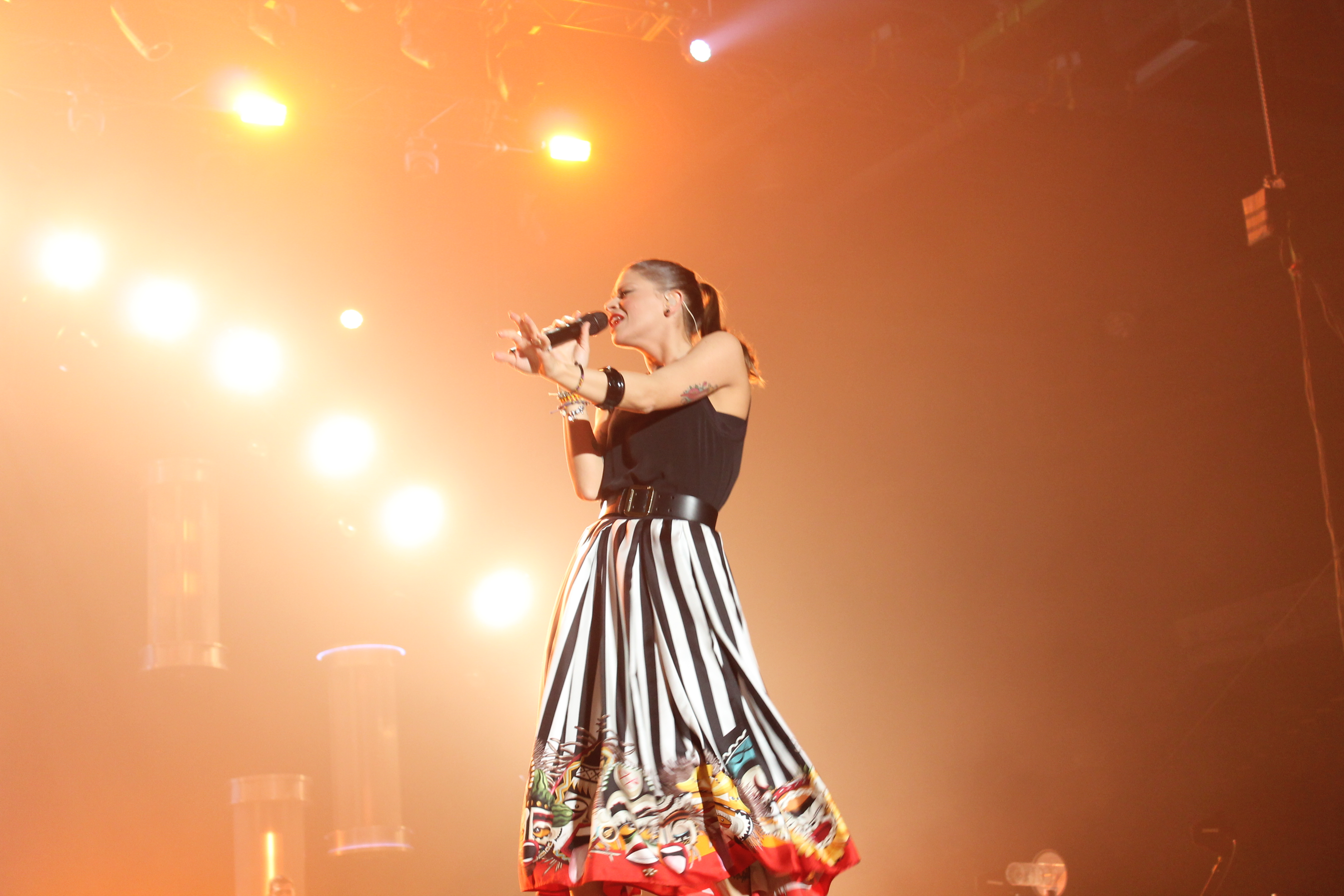 Alessandra Amoroso in concerto al Nelson Mandela Forum il 9 aprile 2014.